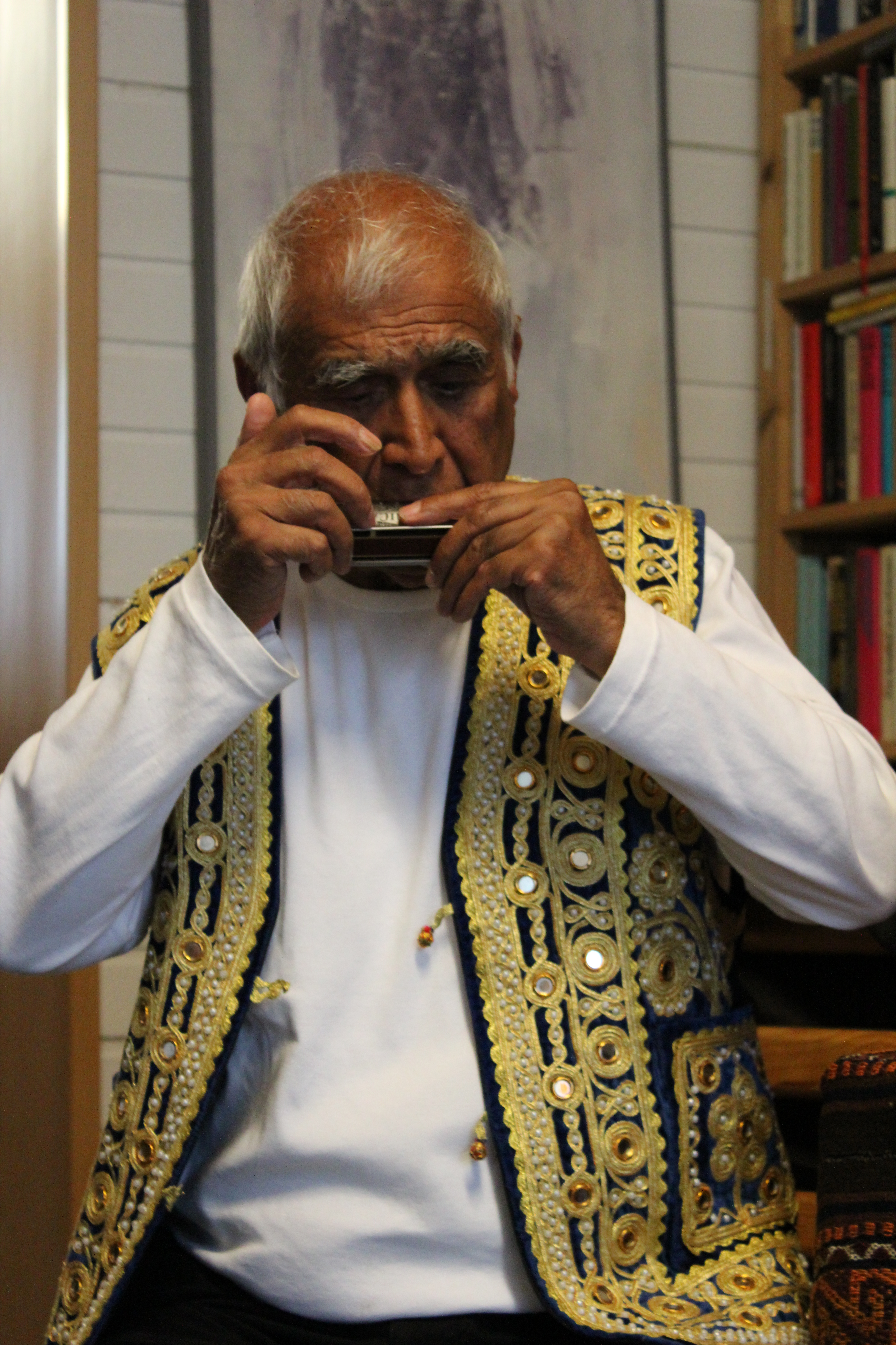 Salamat Schiftah bei einem Konzert im Antiquariat Altenkirchen 2012